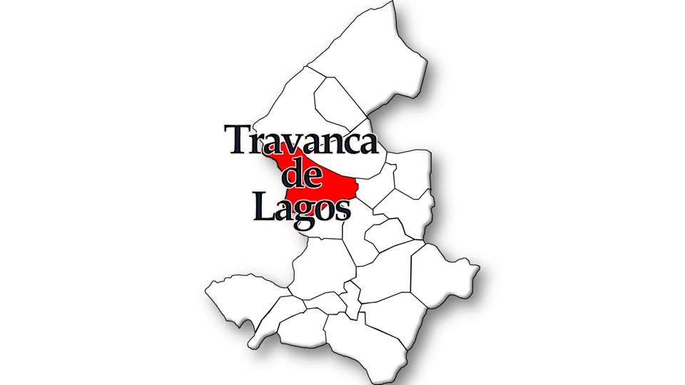 População